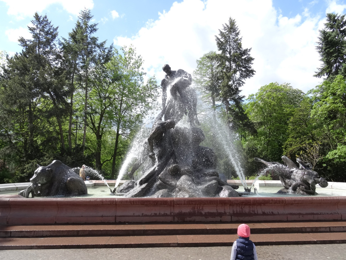 Fontanna Potop w Bydgoszczy (Ferdinand Lepcke, 1904-1643) zrekonstruowana w latach 2006-2014